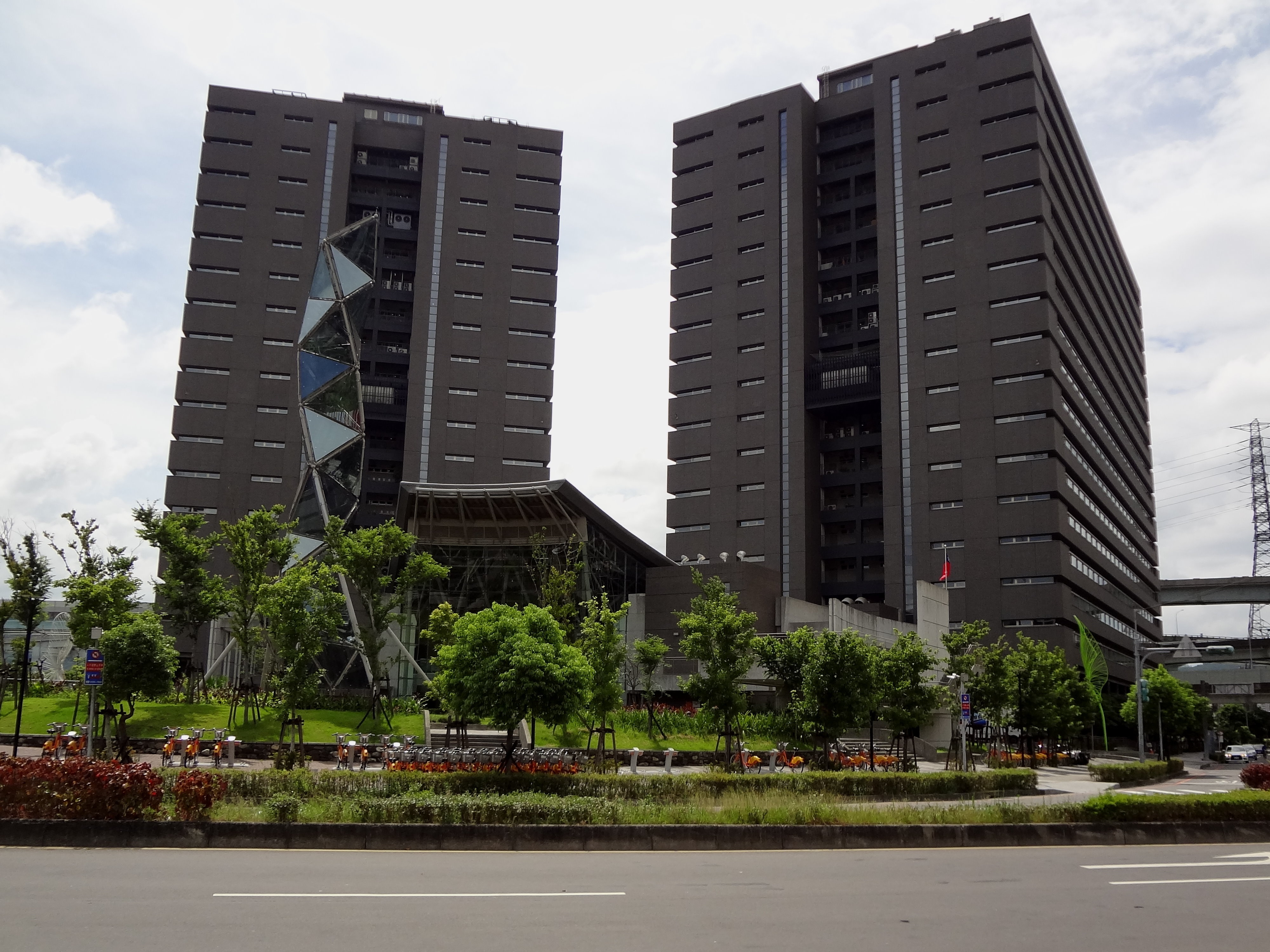 行政院新莊聯合辦公大樓，左為南棟，右為北棟，中央為綠廊。